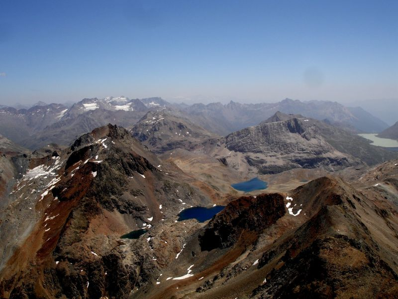 Aussicht vom Piz Languard